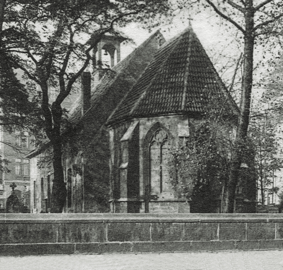 Rückseite der noch unzerstörten Nikolaikapelle von der Nikolaistraße aus (heute: Goseriede)